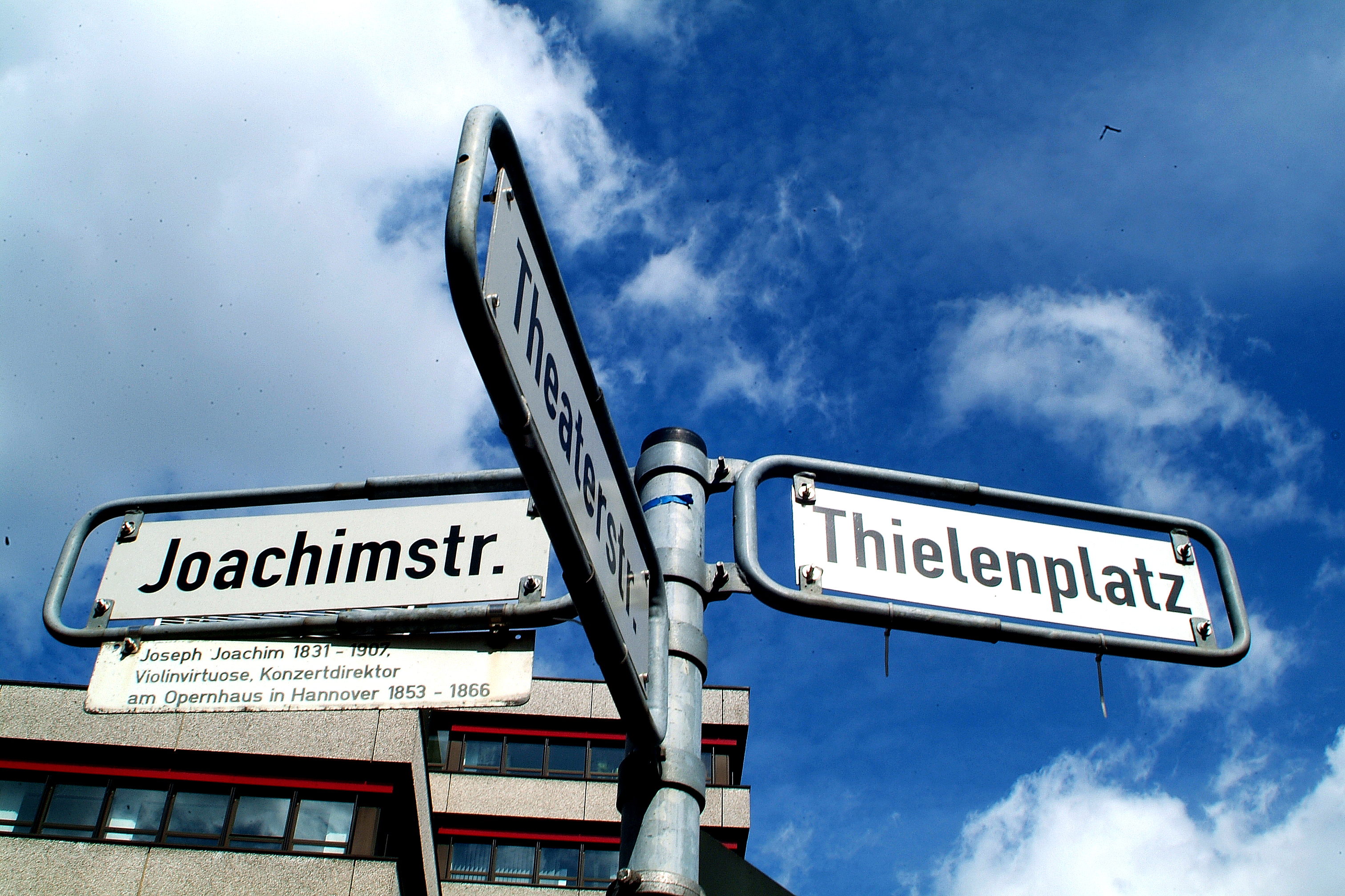 Sie haben ein besseres Bild? Sogar ein historisches Dokument als Bild(ungsförderung)? Zeigen Sie' s uns. Stiften Sie es doch auch - allen Menschen.